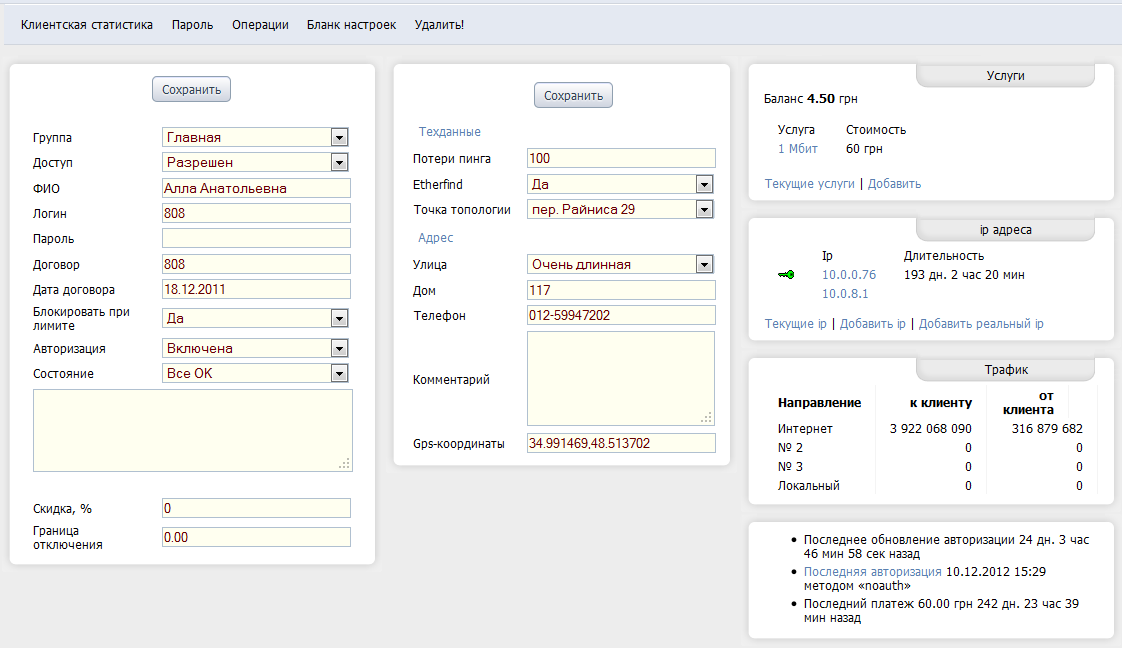 Редактирование настроек юзера биллинговой системы NoDeny+